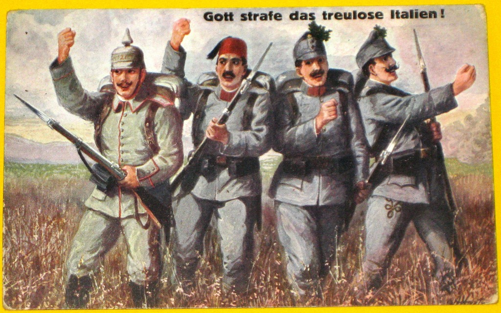 Noch recht euphorische Postkarte für Georg Holub, Artillerist an der neuen italienischen Front: "Lieber Georg! Na, wie gehts, altes Haus es gibt wieder frische Arbeit. Viel Feind viel Ehr! Wie man liest, haut Ihr feste drein und Gott mit Euch. Wir denken immer an Dich. Die herzlichsten Grüße Deine Tante Therese Holub."